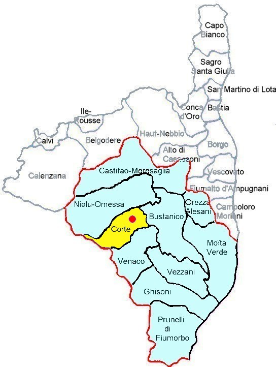 Localisation du canton de Corte, Corti, Tàlcini, Haute-Corse